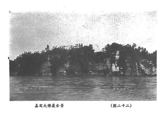 中文（台灣）: 峨眉山老照片